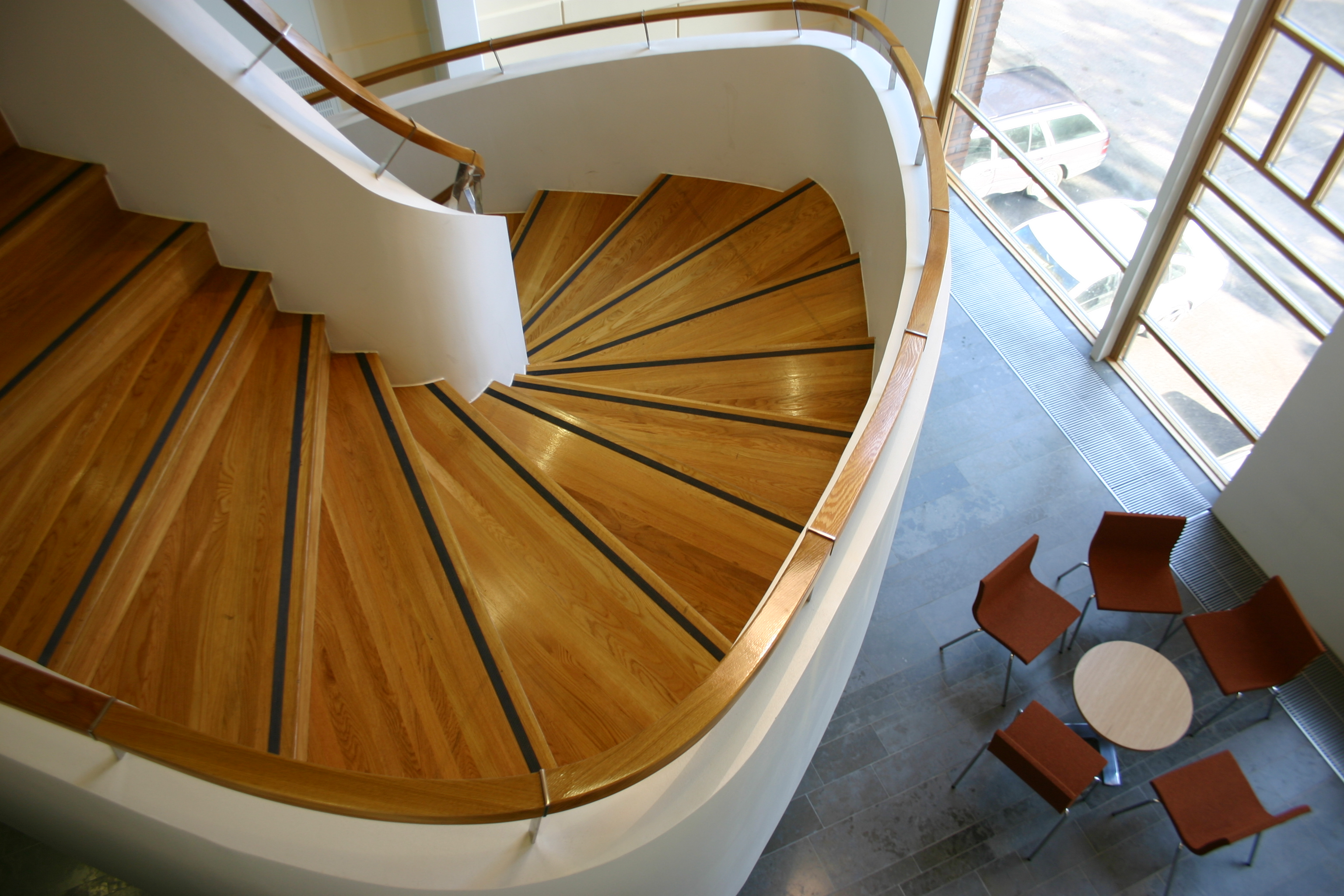 Normaalilyseon väliosarakennuksen aulatila.